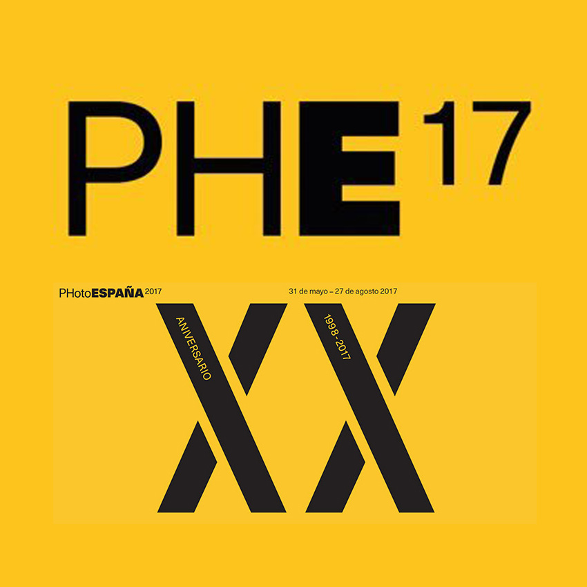 En la mañana de hoy, 31 de mayo, se han presentado las tres exposiciones con las que el Fernán Gómez. Centro Cultural de la Villa participa en la vigésima edición de PHotoESPAÑA. Se trata de Lalibela, cerca del cielo, Carbono y Pensar en futuro. Nuevos relatos fotográficos en Dakar. Los fotógrafos Cristina García Rodero y Gil Antonio Munuera, acompañados por la directora de PHotoESPAÑA, María García Yelo y de algunos de los fotógrafos de la muestra colectiva Nuevos relatos fotográficos en Dakar, han sido los encargados de presentar estas exposiciones que se podrán visitar del 1 de junio al 31 de julio.